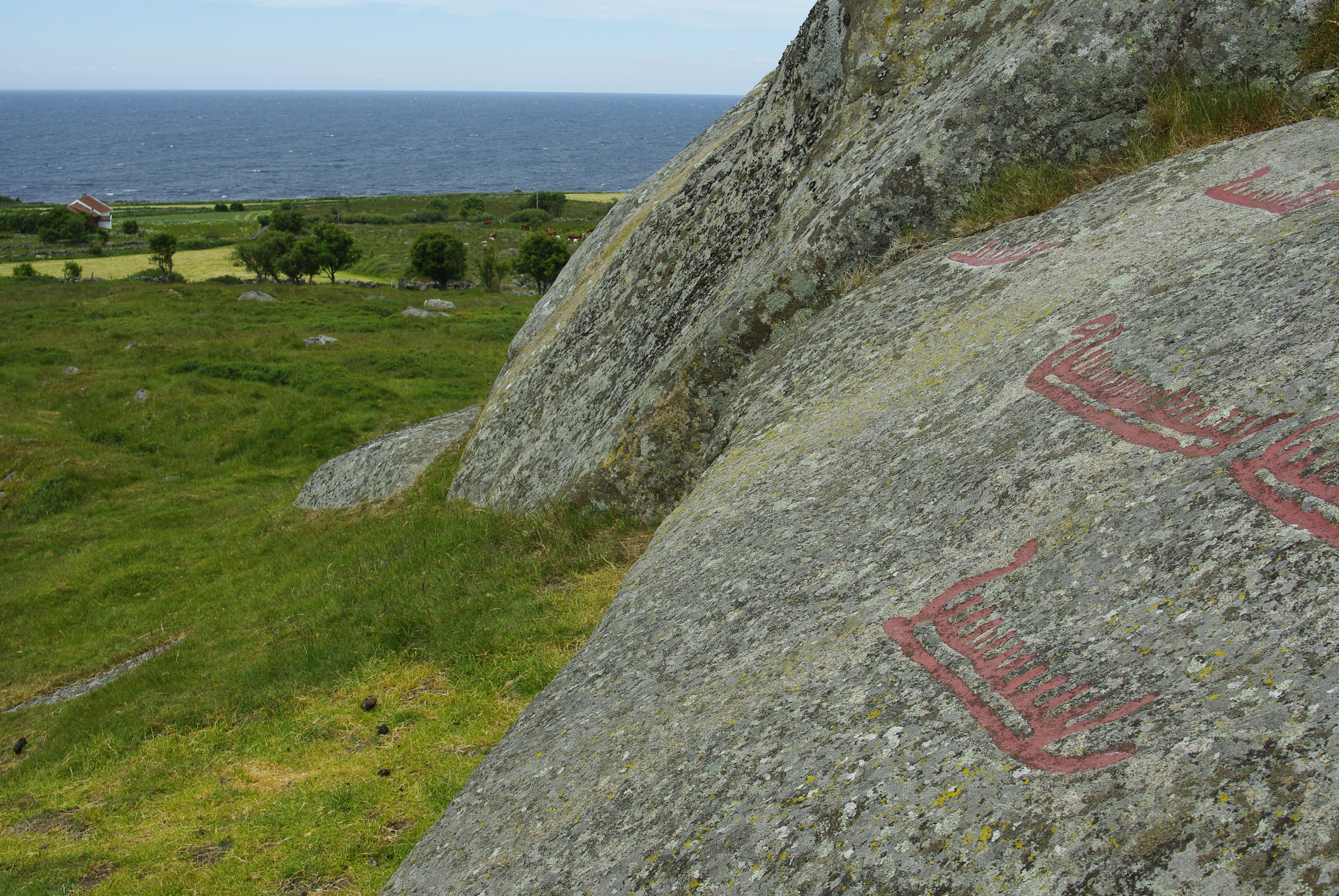 Lista i Norge Data-uid: de663167514197eadaf2cfac04d63bc8